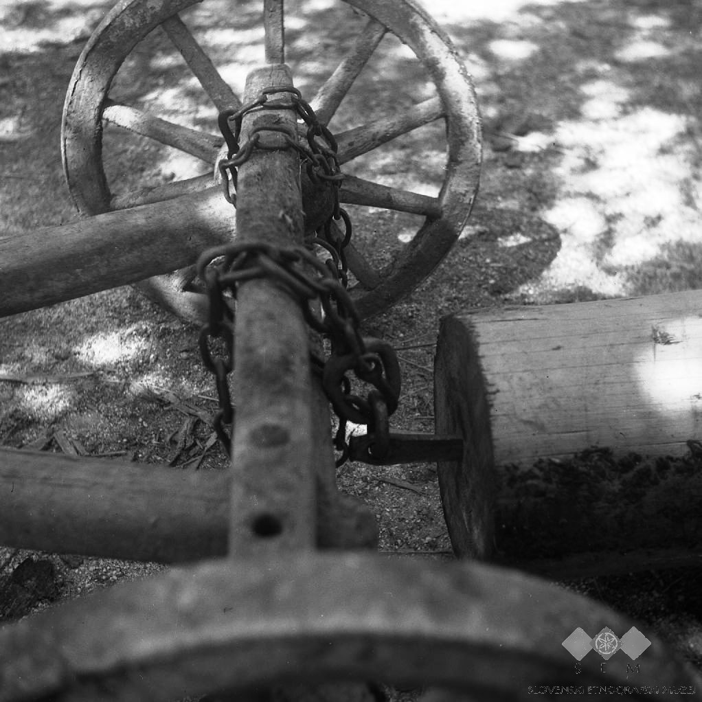 V Mačkih na "štarc vozijo krcl" (deblo oz. hlod), dve prvi premi, zadnja za regiranje. V krclu zasajeni "piki".